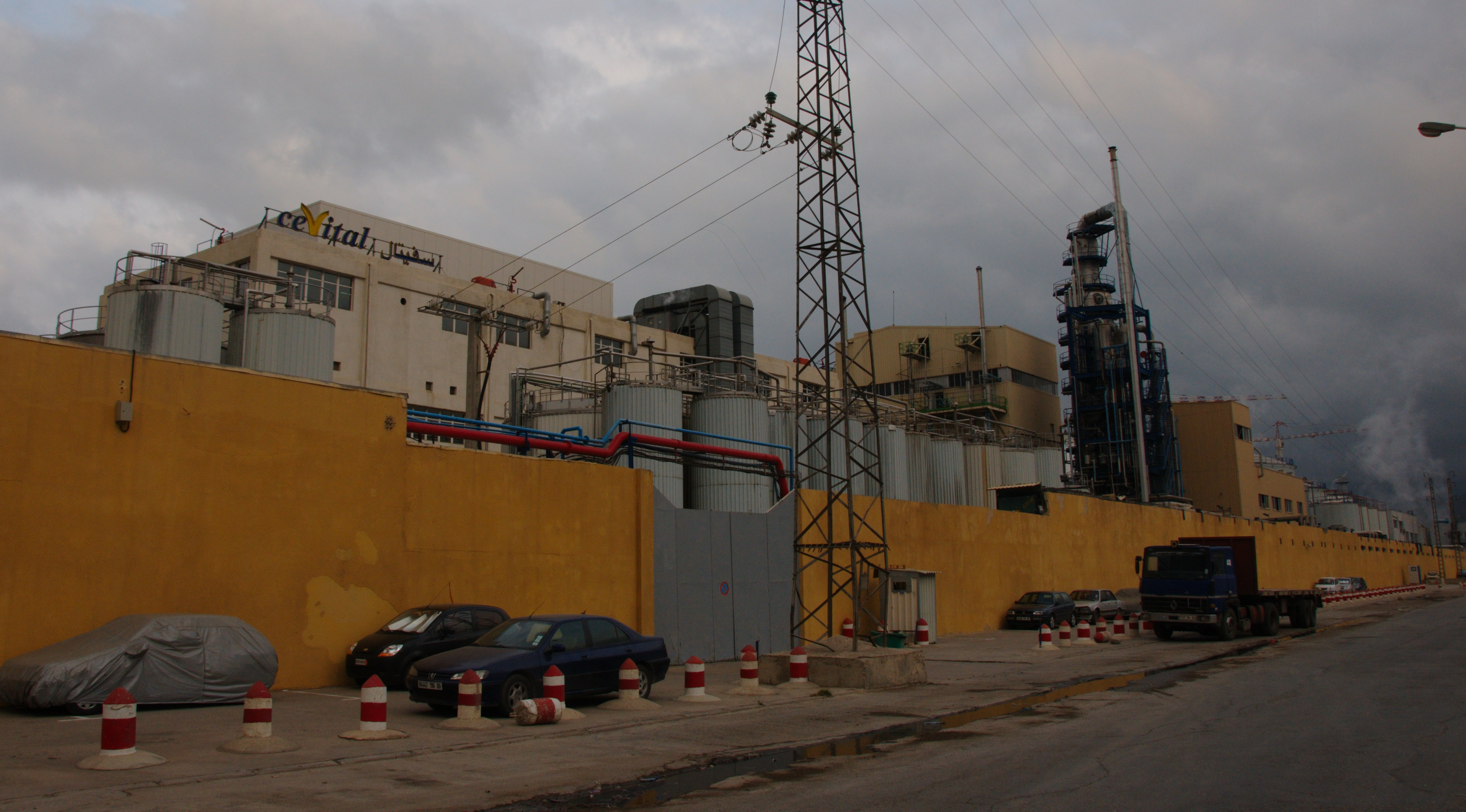 Usine Cévital à Béjaïa